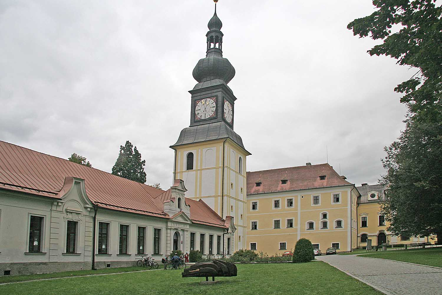 Věž u zámku ve Žďáru nad Sázavou, district Žďár nad Sázavou, Czech Republic autor: Prazak Date: 6. 9. 2006